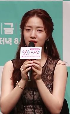 jtbc 금토 드라마 청춘시대-제작발표회 현장